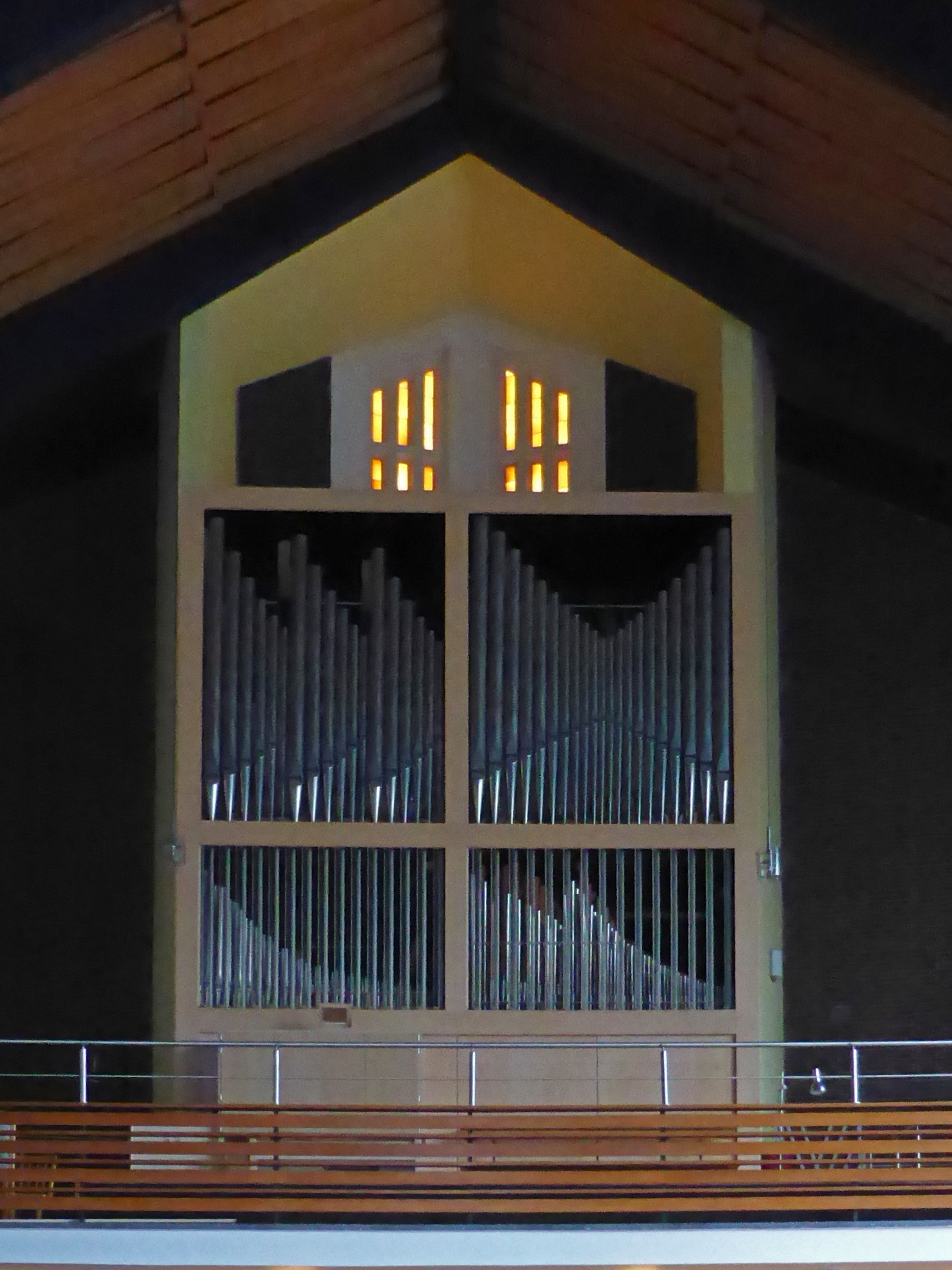 Orgel der katholischen St.-Benno-Kirche in Goslar-Jürgenohl.